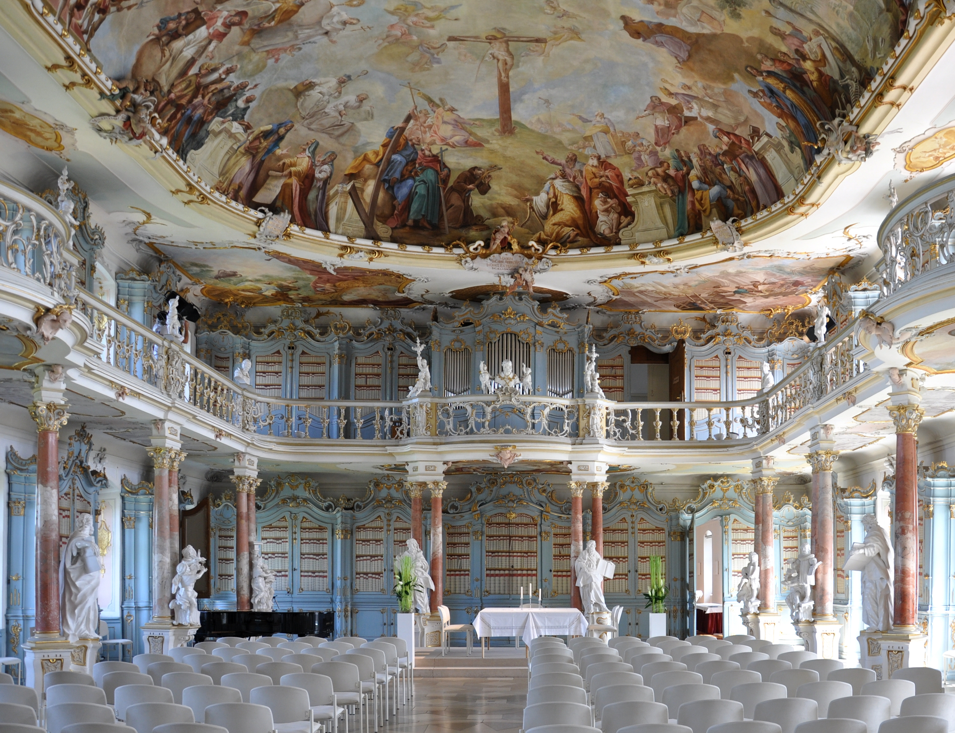 Bad Schussenried, Kloster Schussenried, Neuer Konventsbau, Bibliothekssaal